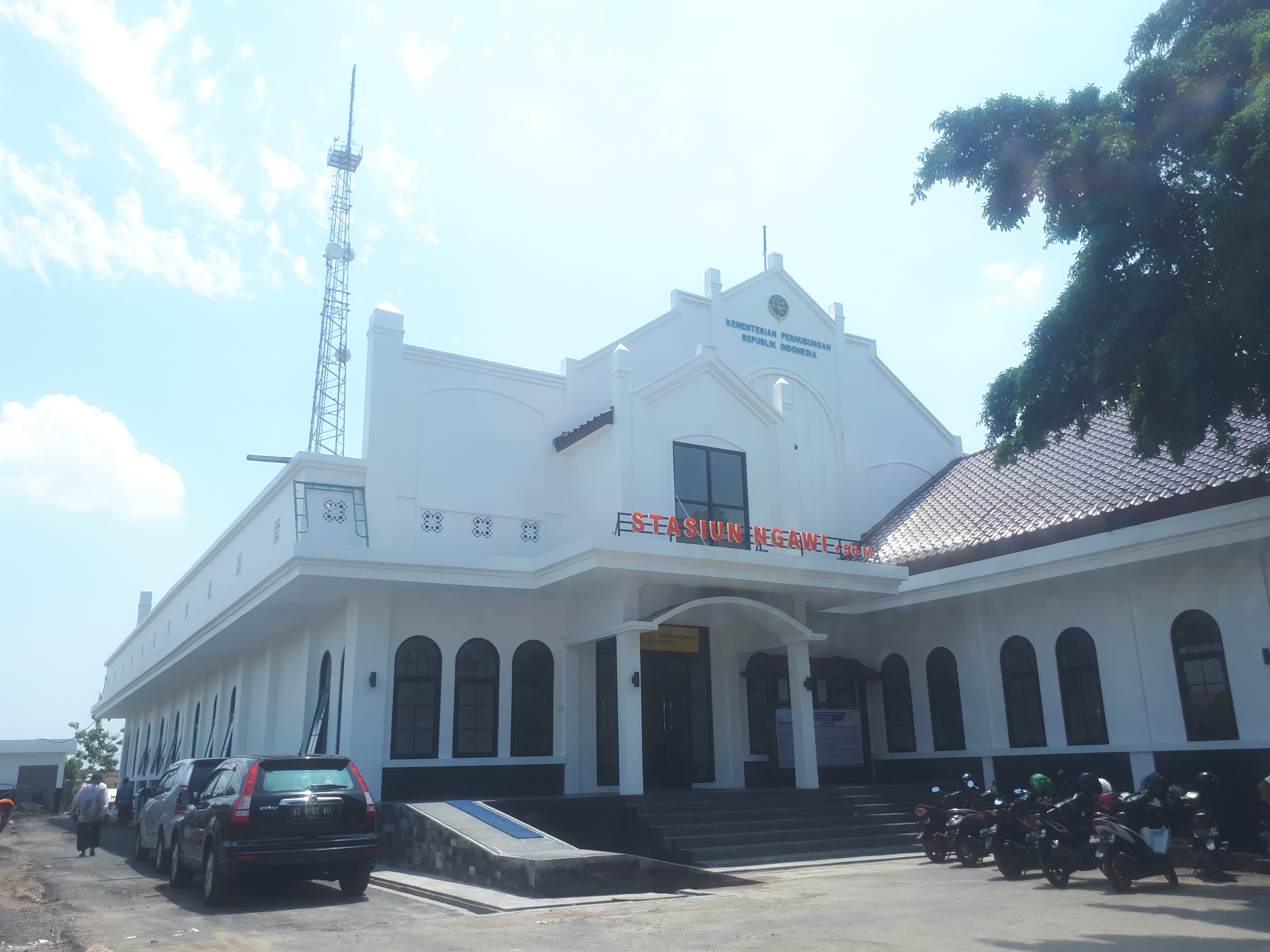 Bangunan baru Stasiun Ngawi — sebelumnya bernama Stasiun Paron — mulai beroperasi pada 30 November 2019 bersamaan dengan aktivasi rel jalur ganda Stasiun Kedungbanteng dan Stasiun Geneng.